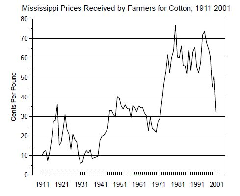 cotton price in Mississippi 1911-2001